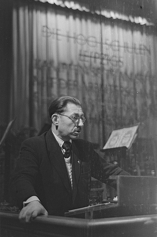 Original image description from the Deutsche FotothekFritz Selbmann am Rednerpult